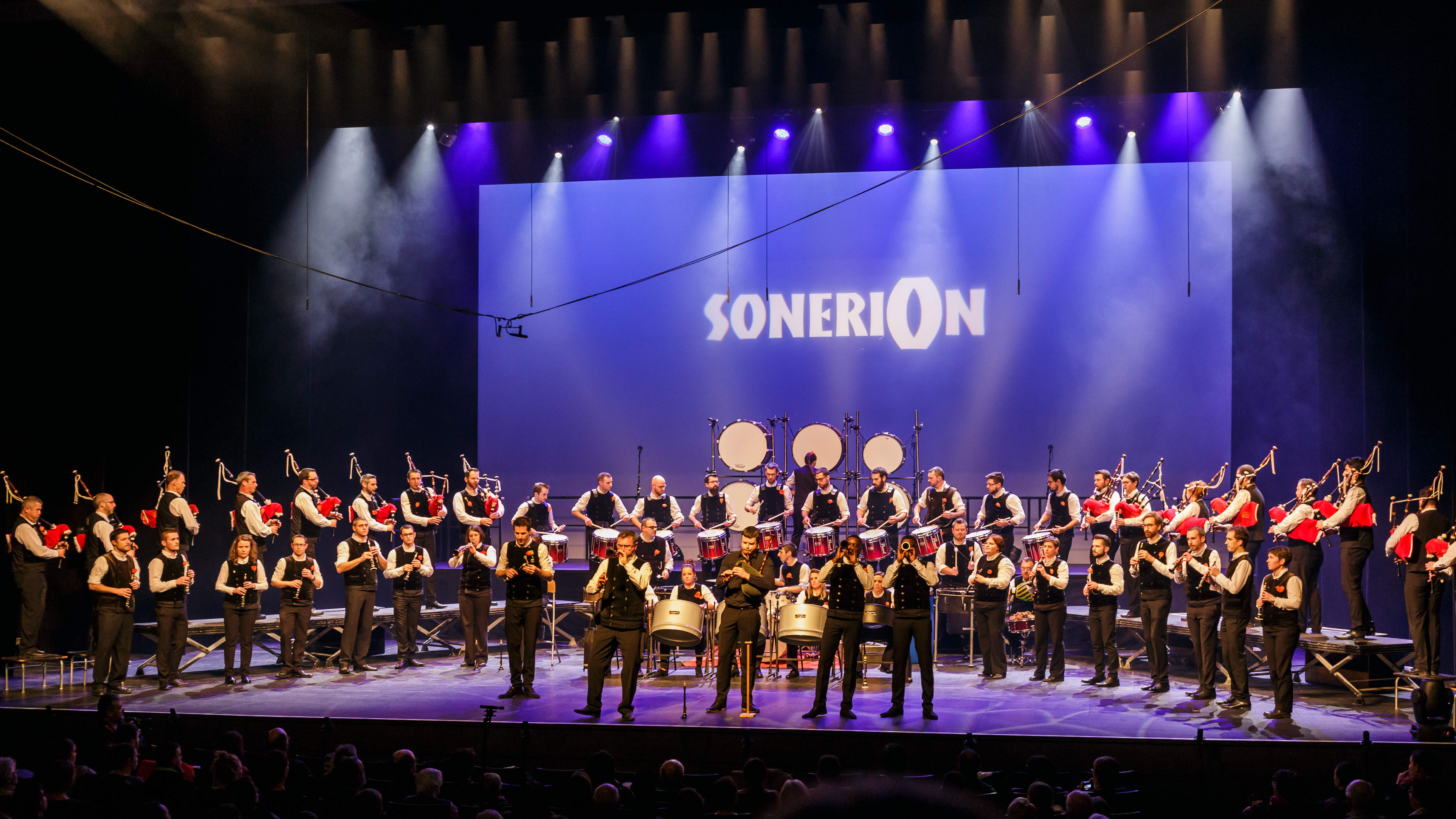 Prestation du bagad Cap-Caval (Plomeur) lors de l'épreuve d'hiver du Championnat national des bagadoù de Première catégorie organisée au Quartz à Brest le 12 février 2017.